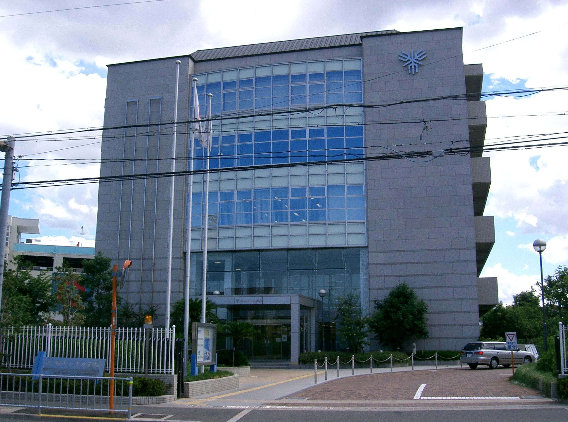 堺市上下水道局